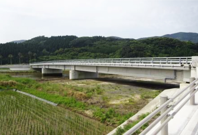 昭和44年に架設された旧市木橋の老朽化に伴い橋梁補修事業を行うもので、架け替えに伴う上部工事を施工したものである。工事期間が10ヶ月と長期間の工事で、地区内で最も橋長の長い市木橋は、地区のシンボル的存在であり、住民の注目度が高い工事でした。